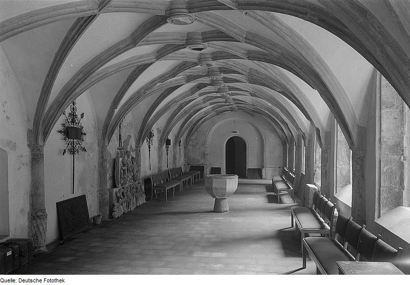 Original image description from the Deutsche Fotothek Saalfeld. Stadtmuseum im Franziskanerkloster, Eingang (Kreuzgang)